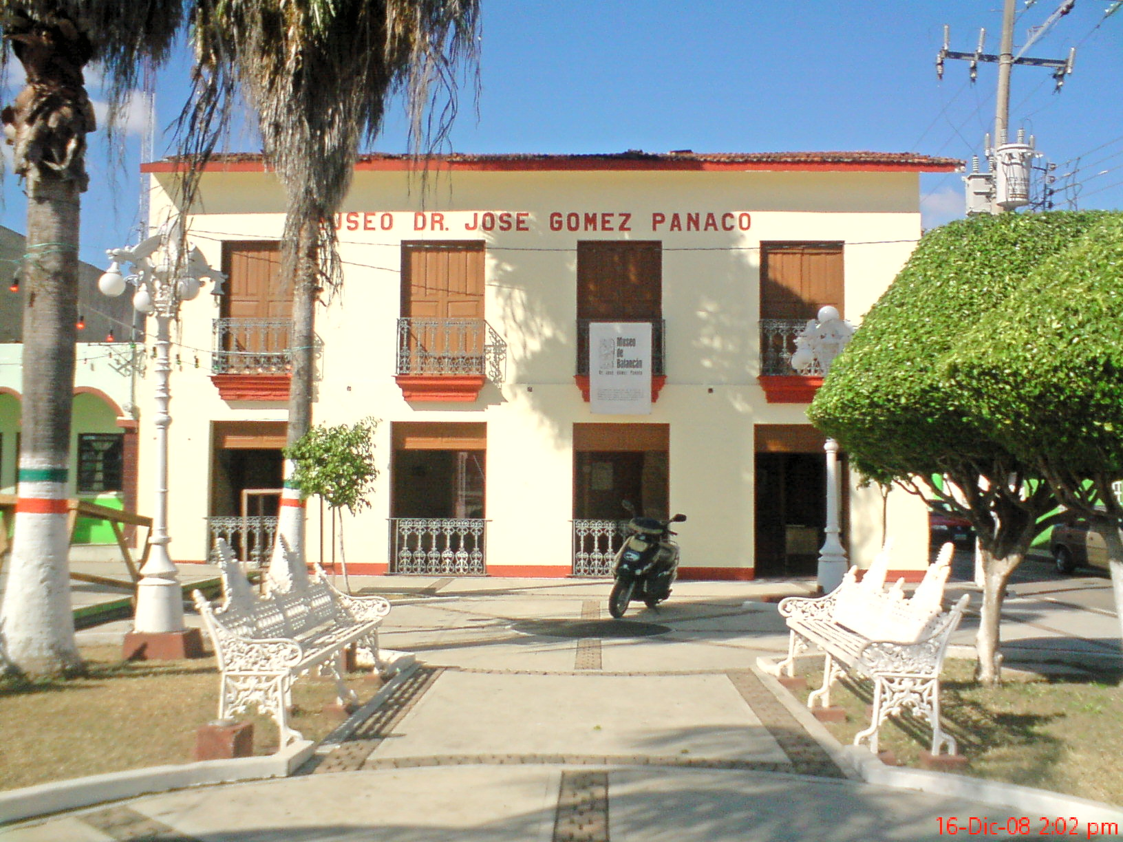 Está ubicado en un edificio construido a finales del siglo XIX y principios del XX. Abrió sus puertas al público el 17 de agosto de 1979, con el objetivo de preservar y difundir el patrimonio arqueológico de la cultura maya. Parte importante de su colección fue donada por el doctor de origen cubano Gómez Panaco, quien radicó durante muchos años en Balancán. Cuenta con 3 salas en dos niveles; en la planta baja se exhiben estelas, altares y monolitos de la cultura maya del período clásico, procedentes de Reforma y Santa Elena; vitrinas con muestras de cerámica y figurillas antropomorfas, olmecas y mayas encontradas en diversos sitios arqueológicos del municipio. En otra sala se exhiben retratos del poeta Carlos Pellicer Cámara considerado el principal promotor de las culturas precolombinas de América, así como fotografías antiguas de famosas embarcaciones fluviales que recorrían los ríos a principios del siglo XX, como el vapor “El Carmen”; en la segunda planta se pueden apreciar una serie de mapas, dibujos y fotografías que muestran diversos aspectos de la cultura maya.